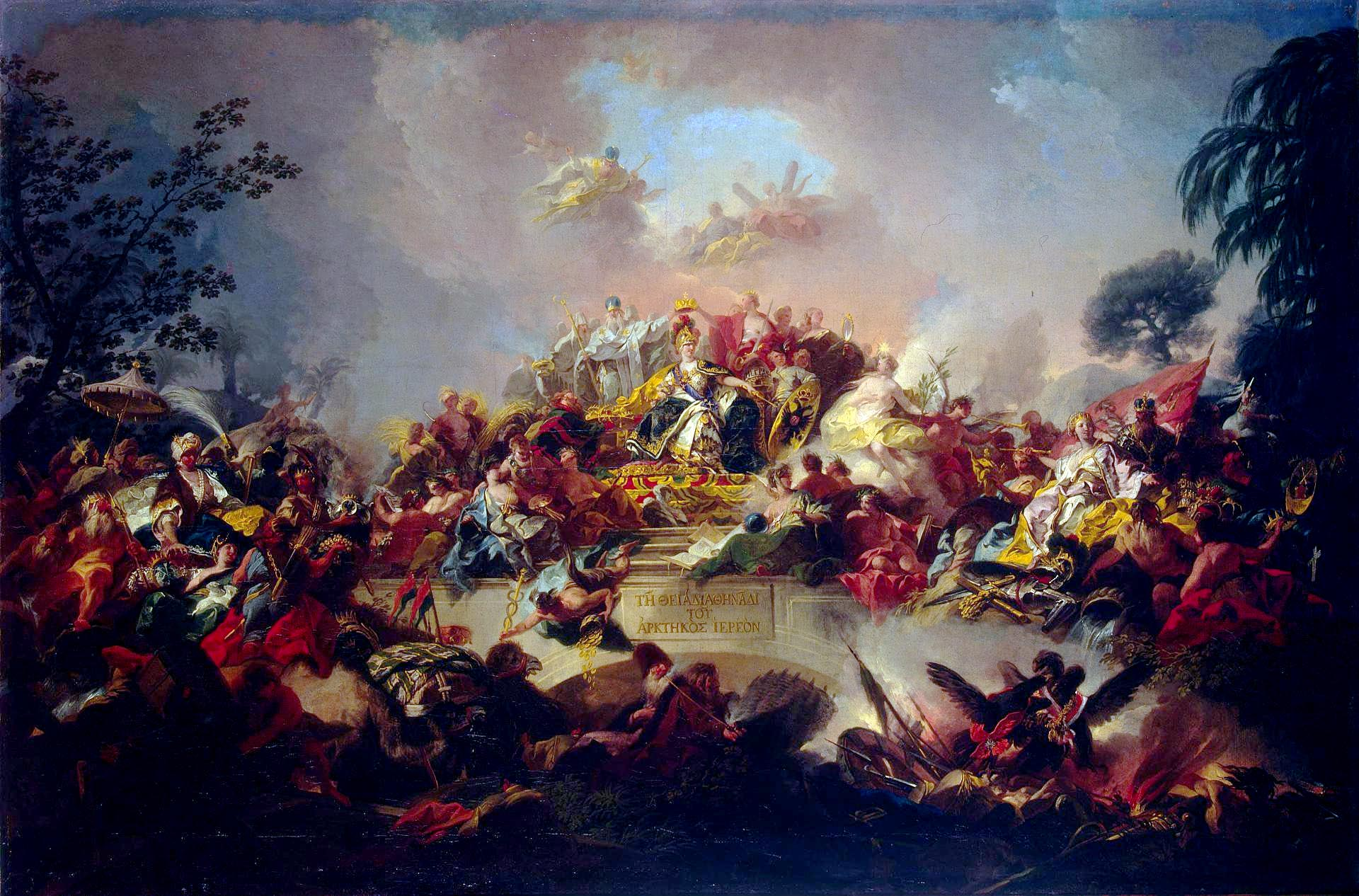 Апофеоз царствования Екатерины II" является детально проработанным эскизом плафона для Большого зала Екатерининского дворца в Царском Селе. Сам плафон осуществлен не был. Обратиться с заказом к неизвестному в то время в России итальянскому мастеру посоветовал императрице скульптор Этьен Фальконе. Гульельми, работавшему тогда в Аугсбурге, была послана программа будущего произведения, но ее автор неизвестен. В центре композиции представлена Екатерина II в традиционном для ее аллегорических изображений образе Минервы, богини мудрости, но с царскими регалиями и голубой лентой ордена Андрея Первозванного через плечо. По сторонам от нее фигуры, олицетворяющие духовную и светскую власть, а также аллегории Мира и Благоразумия. Царствование Екатерины - время расцвета наук и искусств, о чем призваны напомнить фигуры Живописи, Музыки, Архитектуры, Астрономии у подножия ее трона. Богатство и процветание страны олицетворяют женская фигура со снопом - Плодородие - и Меркурий, бог торговли и покровитель ремесел, с рогом изобилия, полным золотых монет. С обеих сторон к трону стремятся народы, населяющие империю, а в облаках изображены святые покровители России.